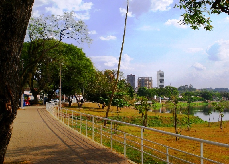 Calçada da Avenida Beira-Rio